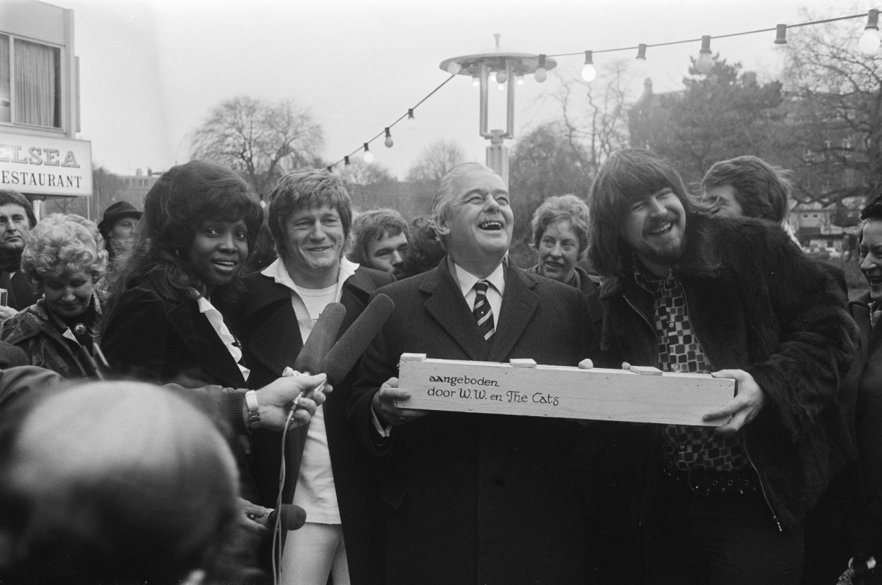 Amsterdamse Lido op Leidseplein heropend; Molly Geertsema (Commissaris van de Koningin in Gelderland) en Piet Veerman (The Cats)Zie ook het krantenartikel uit De Telegraaf: Geertsema in "Volendam', 14 januari 1975